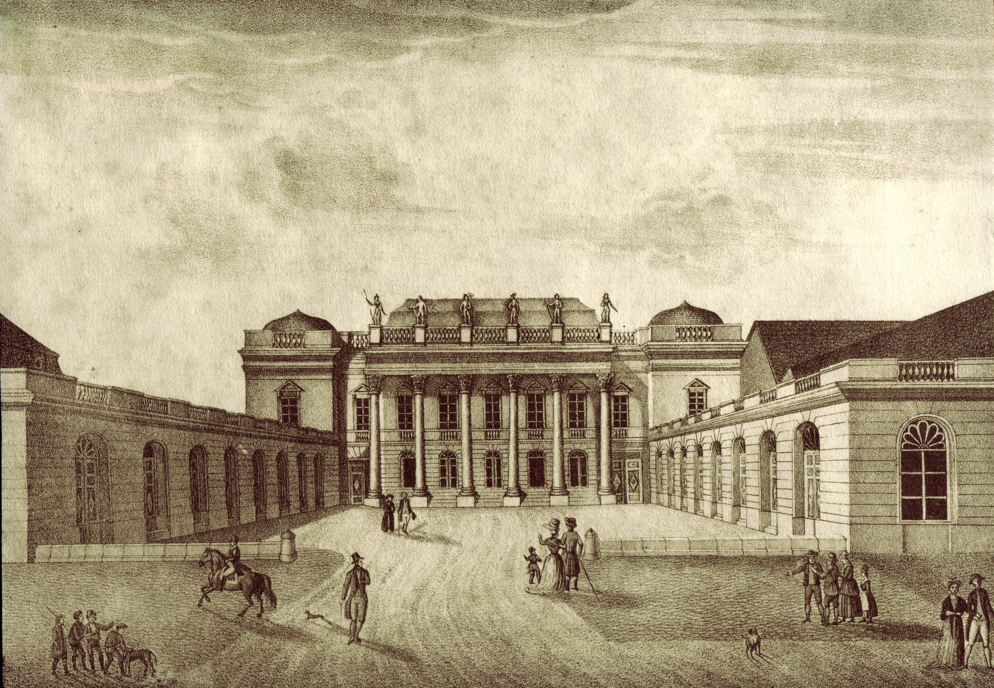 [Originalbeschreibung] Die Domprobstei war gelegen auf dem Platze wo gegenwärtig das Theater steht. Damian Friederich von und zu der Leyen liess sie erbauen, kurz nach seiner Ernennung zum Domprobste, welche statt hatte am 24. September 1781, durch den Baumeister Mangin aus Metz. Ihre Haupttachse war von Glas mit einem Drahtnetze überzogen. Ihre Frontseite war gegen die Seite gerichtet, wo gegenwärtig das Guttenbergs-Monument steht. Hier war sie durch ein eisernes Gitterwerk mit eisernem Gitterthor gegen die Strasse hin abgesperrt. Dieselbe brannte ab bei der Belagerung der vereinten deutschen Mächte am Abend des 29. Juni 1793. Ihre Überreste verschwanden nach und nach durch anderweitige Verwendungen.